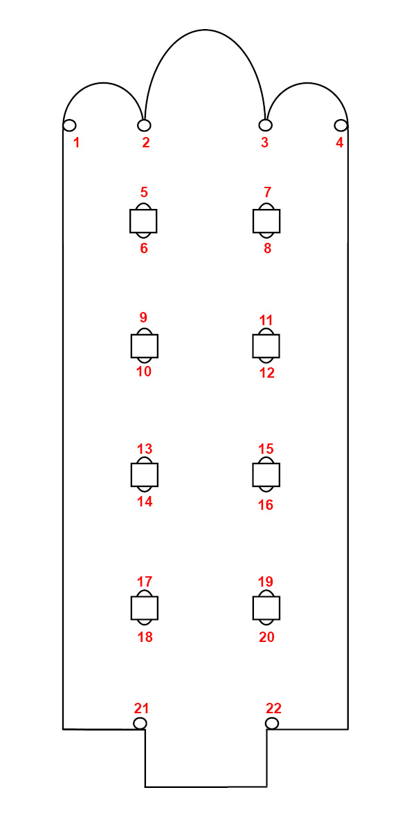 Plan nef chapiteaux